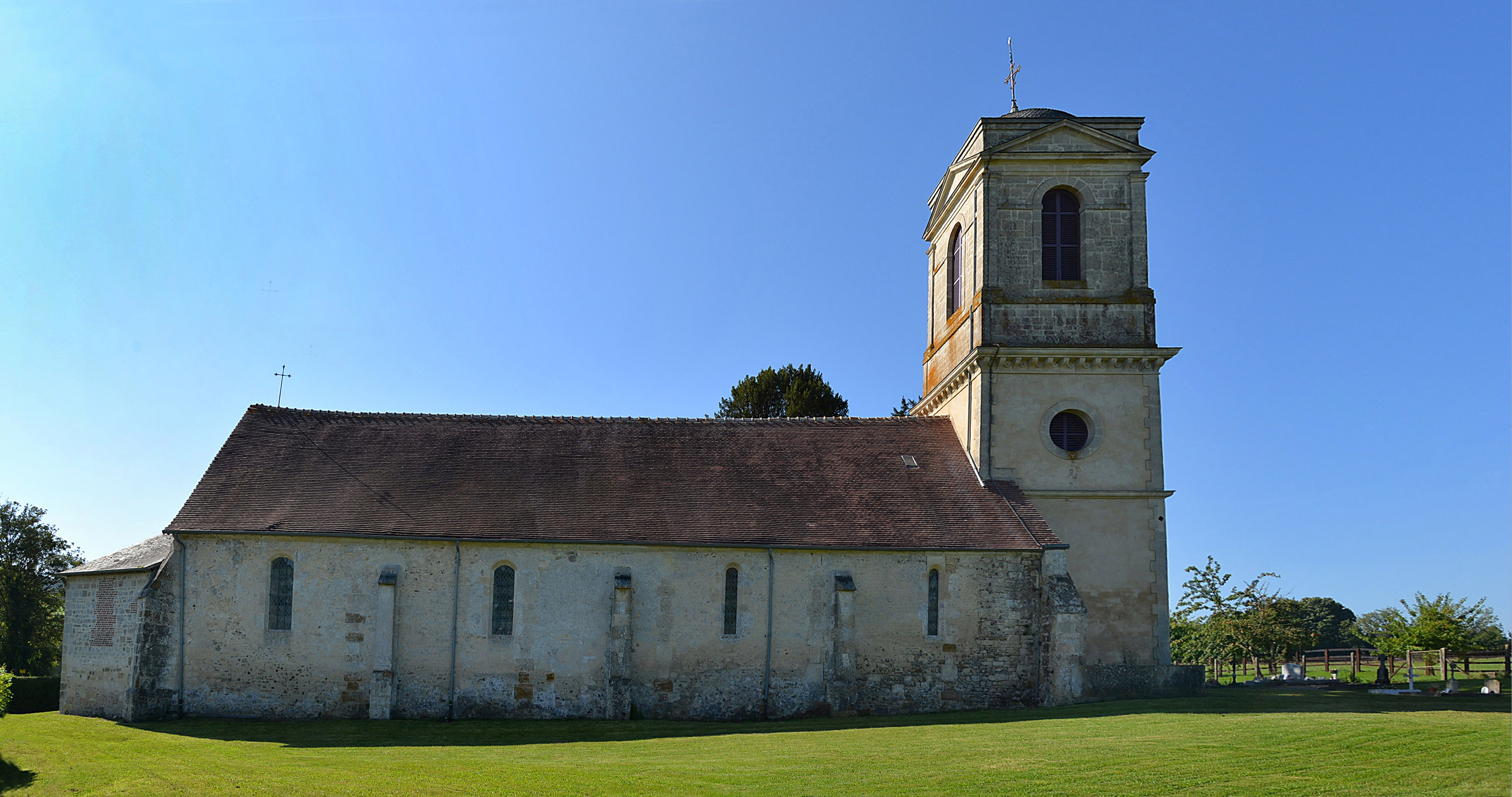 Église Saint-Martin de Survie (Orne)